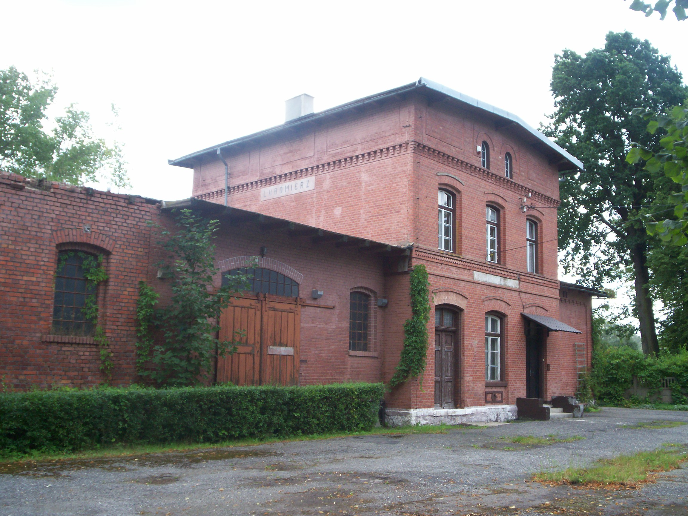 Lubomierz, dawna stacja kolejowa.